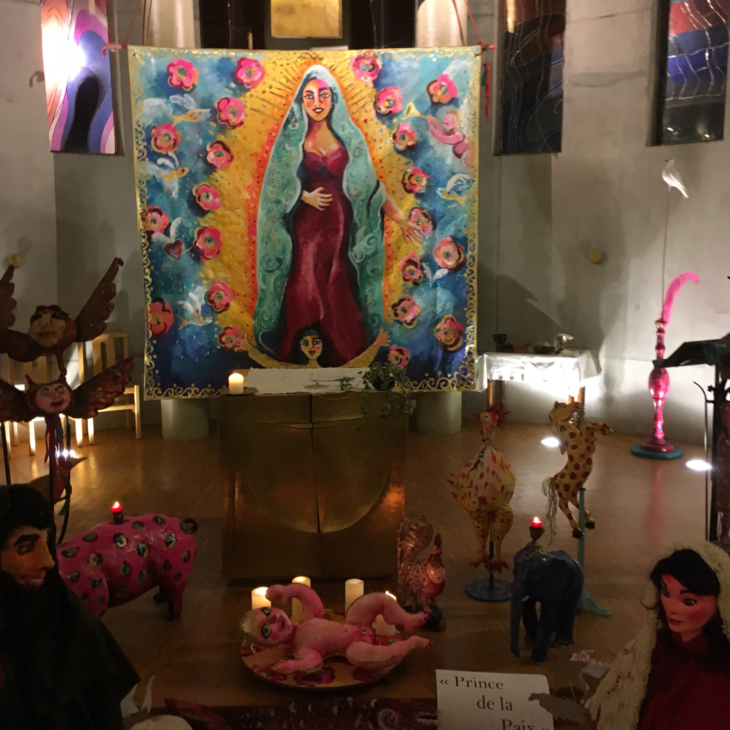 Oeuvre offerte d'Éric Brossier et Linda Hede